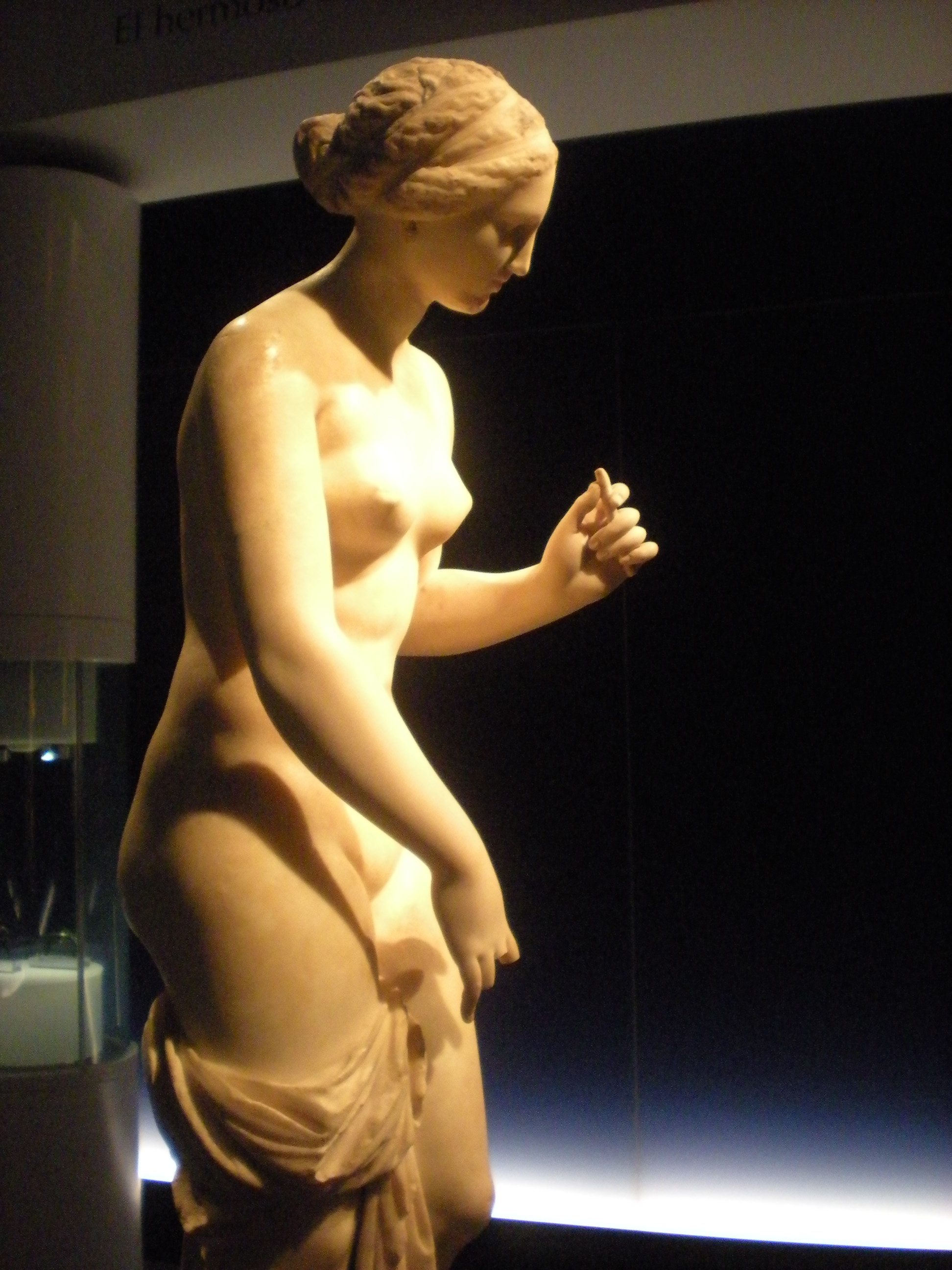 Estatua de Afrodita en mármol de Paros. La obra de Praxíteles sirvió de inspiración para numerosas copias y variantes. En esta versión a tamaño reducido, los brazos fueron restaurados por el escultor inglés Joseph Nollekens a finales del siglo XVIII. Un leve resalte en la barbilla apunta a que, en el original, la diosa alzaba la mano tocándose el rostro con los dedos. Época romana, versión de un original griego del siglo IV a. C., procedente de Ostia, Italia. Dimensiones. 1070 mm x 330 mm x 350 mm. GR 1805,0703.16 (escultura 1577). Pertenece a la exposición La belleza del cuerpo, en el MARQ. Forma parte de la exposición permanente del Museo Británico.